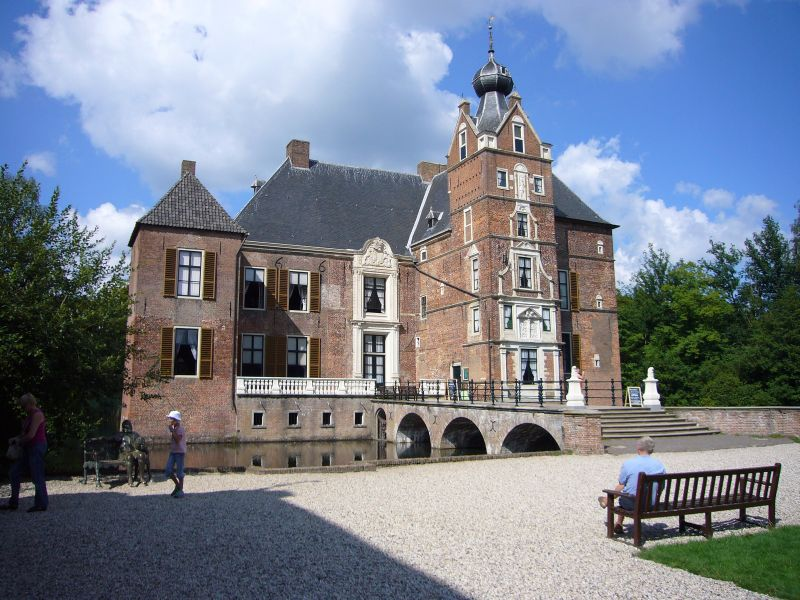 Kasteel de Cannenburgh bij Vaassen. Eigen foto Caseman augustus 2006